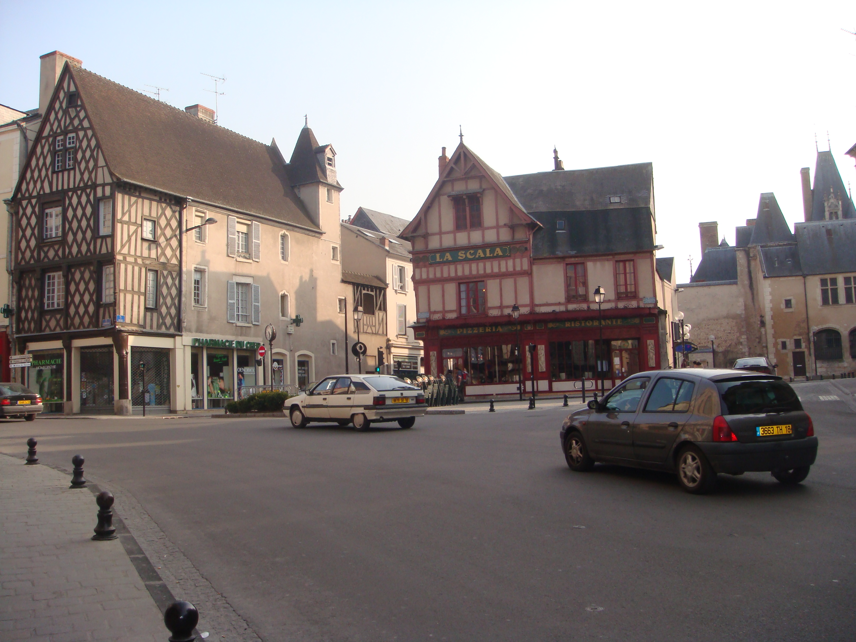 La place Planchat à Bourges (Cher, France).